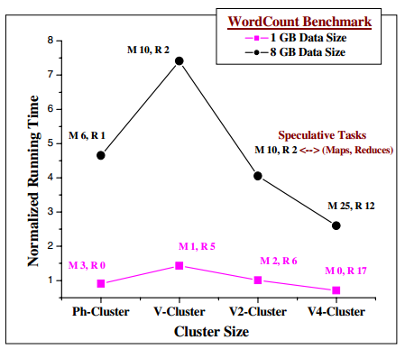 Cluster physique vs cluster machine virtuelle